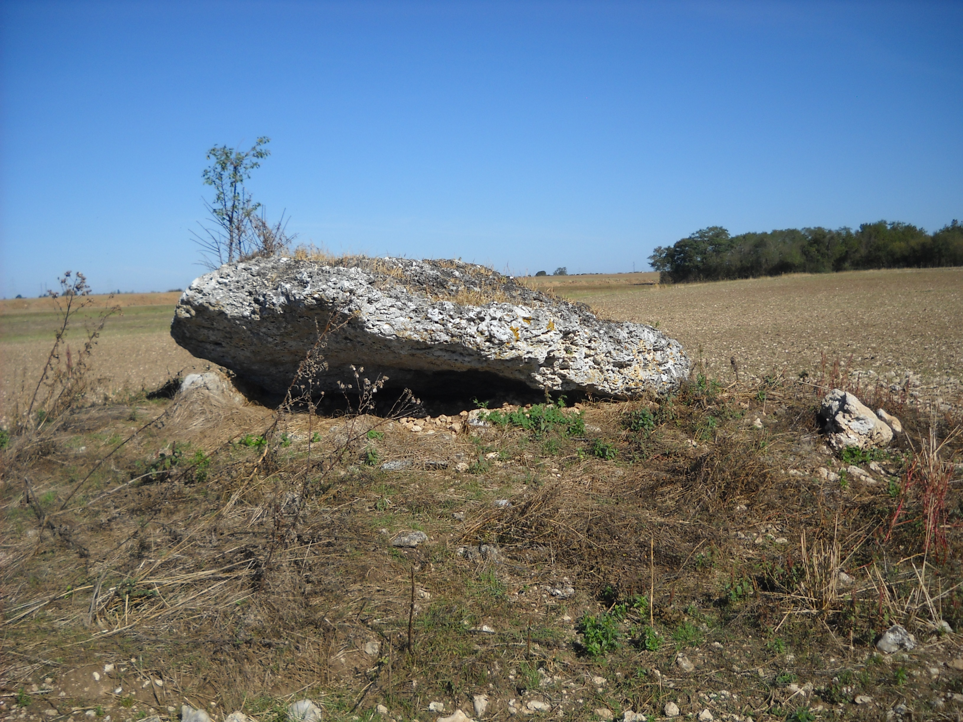 A l'arrière-plan, on voit le bois cachant le dolmen de "La pierre tournante" .